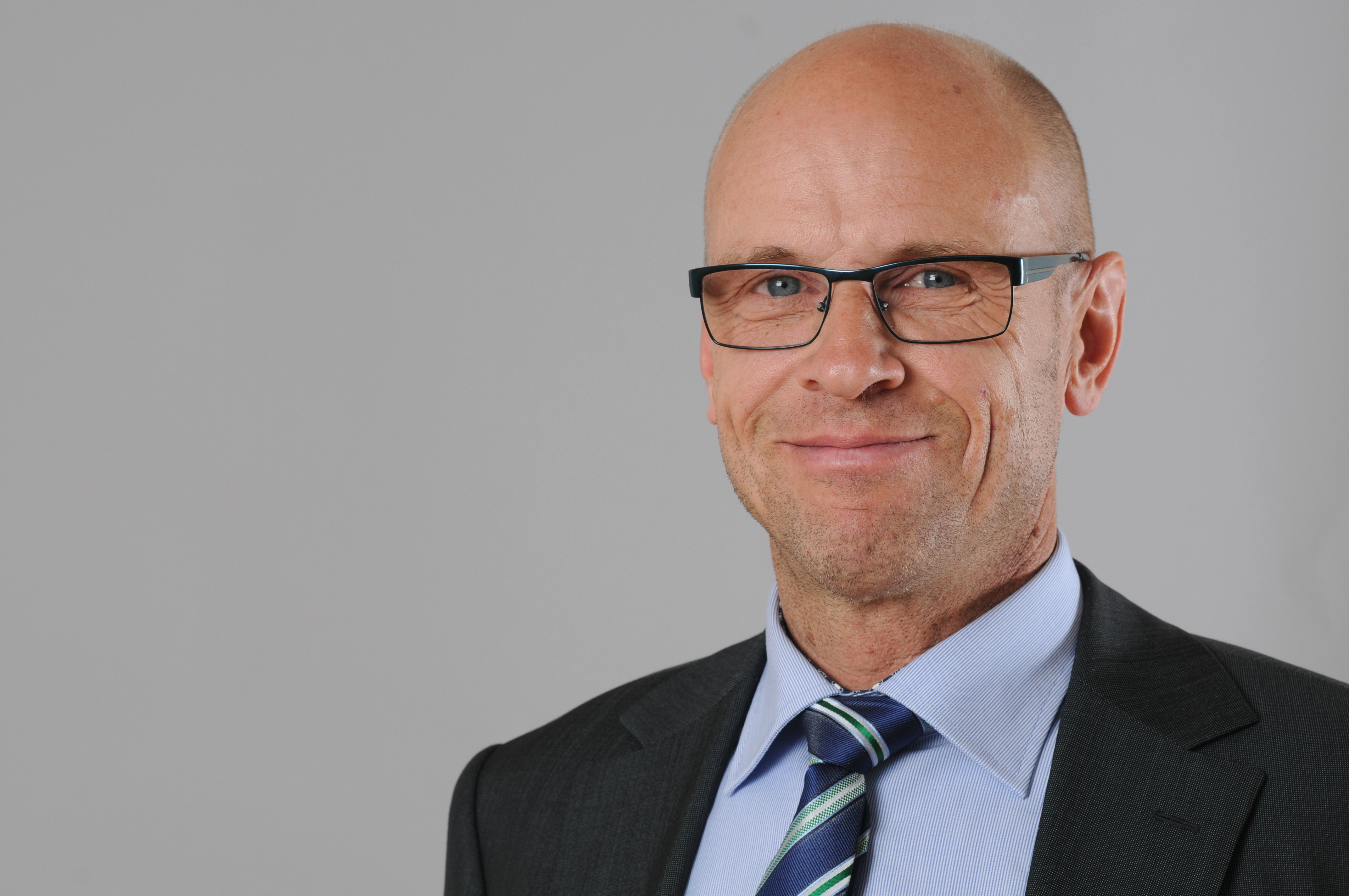 Walter Naderer. Abgeordneter zum Landtag von Niedeösterreich.